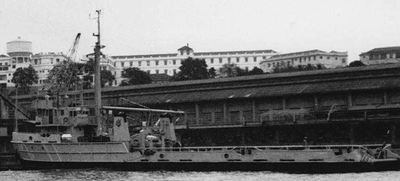 O Navio Auxiliar Trindade - R-26, atracado no Arsenal de Marinha do Rio de Janeiro. Marinha do Brasil - Naval ship of Brazil - Towboat.